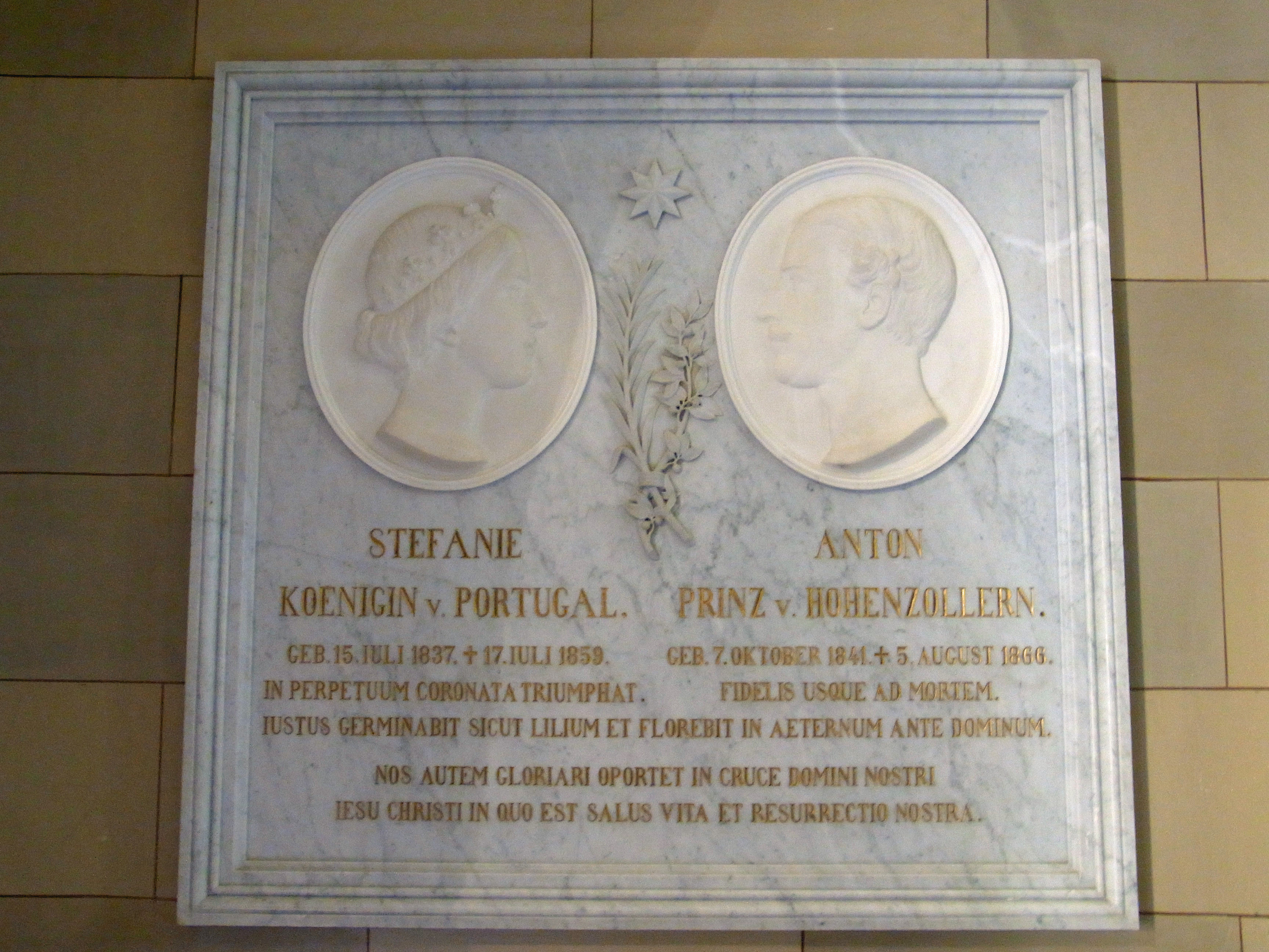 Burg Hohenzollern: Michaelskapelle - Vorraum-Erinnerungstafel für Stephanie von Hohenzollern-Sigmaringen und Anton von Hohenzollern-Sigmaringen